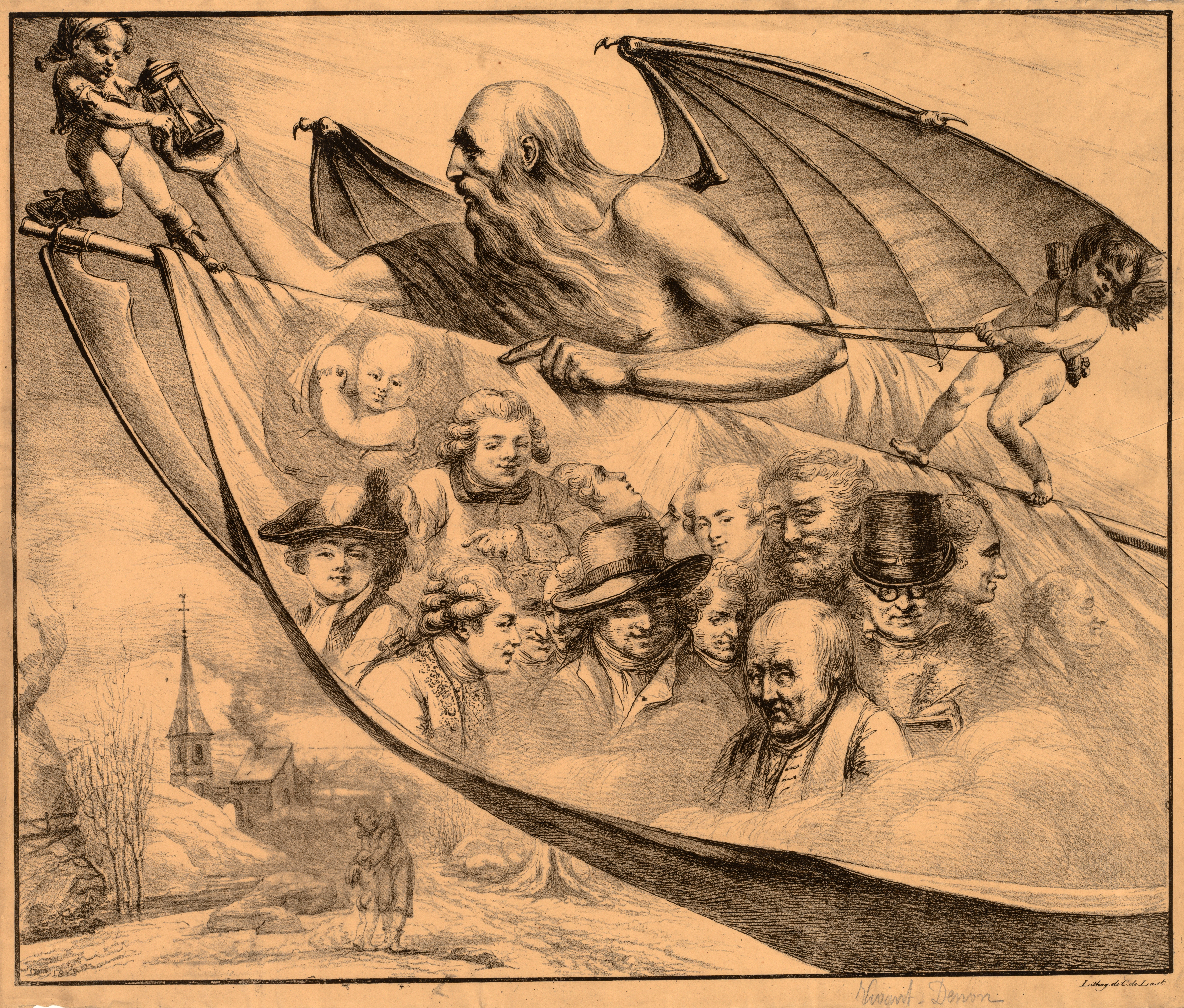 Vivant Denon - Portraits of the artist at different ages (1818)